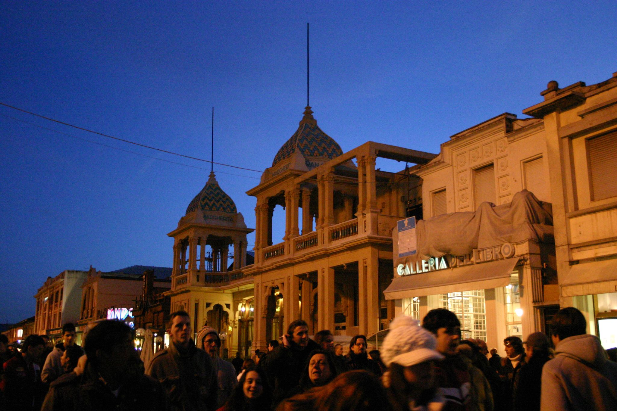 il gran caffè margherita, caffè letterario di inizio novecento. Architettura Eclettica